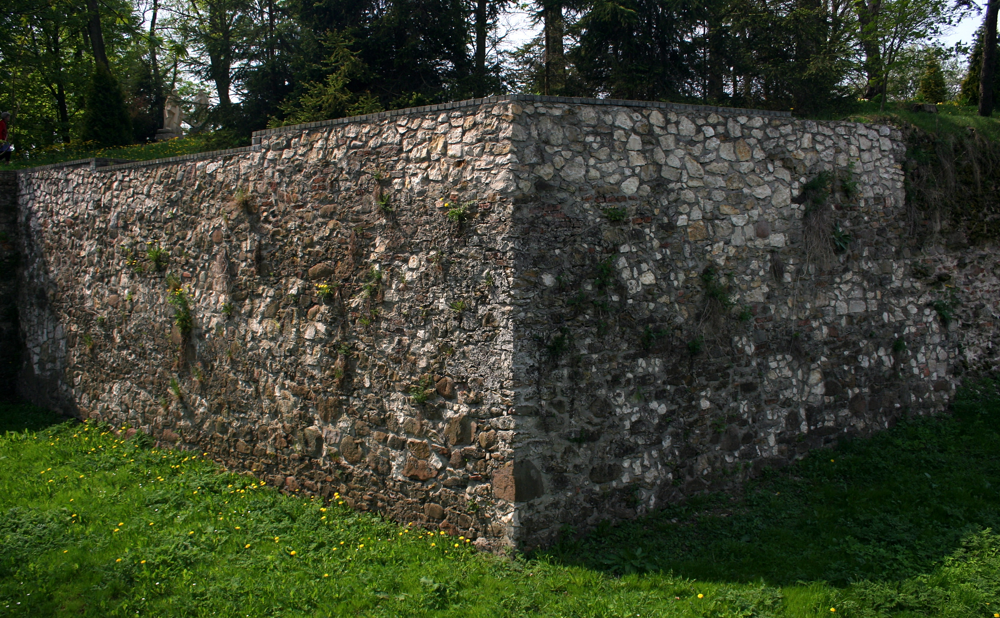 Fragment murów zamku w Dankowie, woj. śląskie